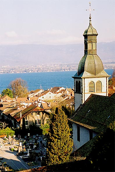 Kirche von Hermance